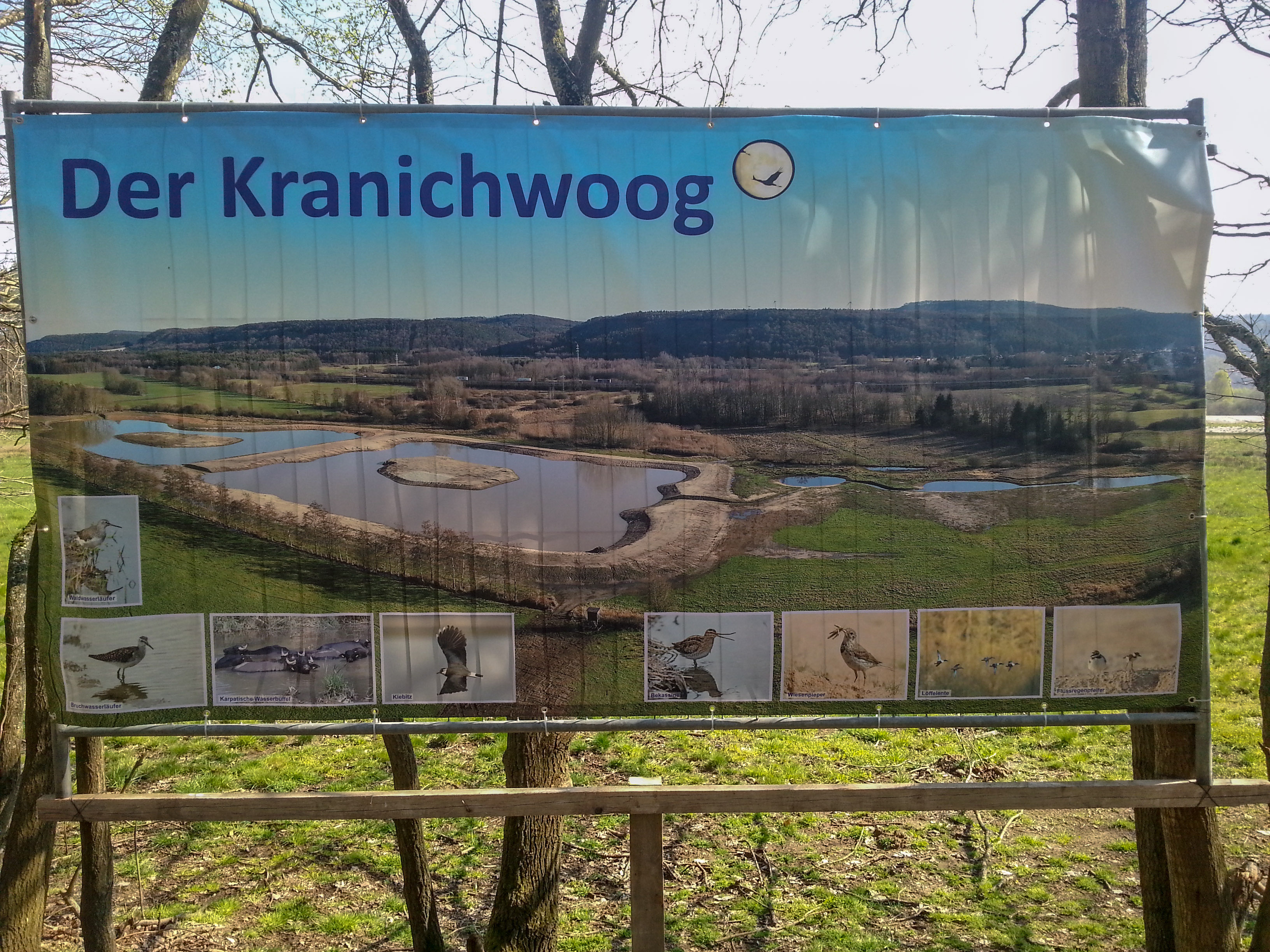 Infotafel des Naturschutzprojekts Kranichwoog